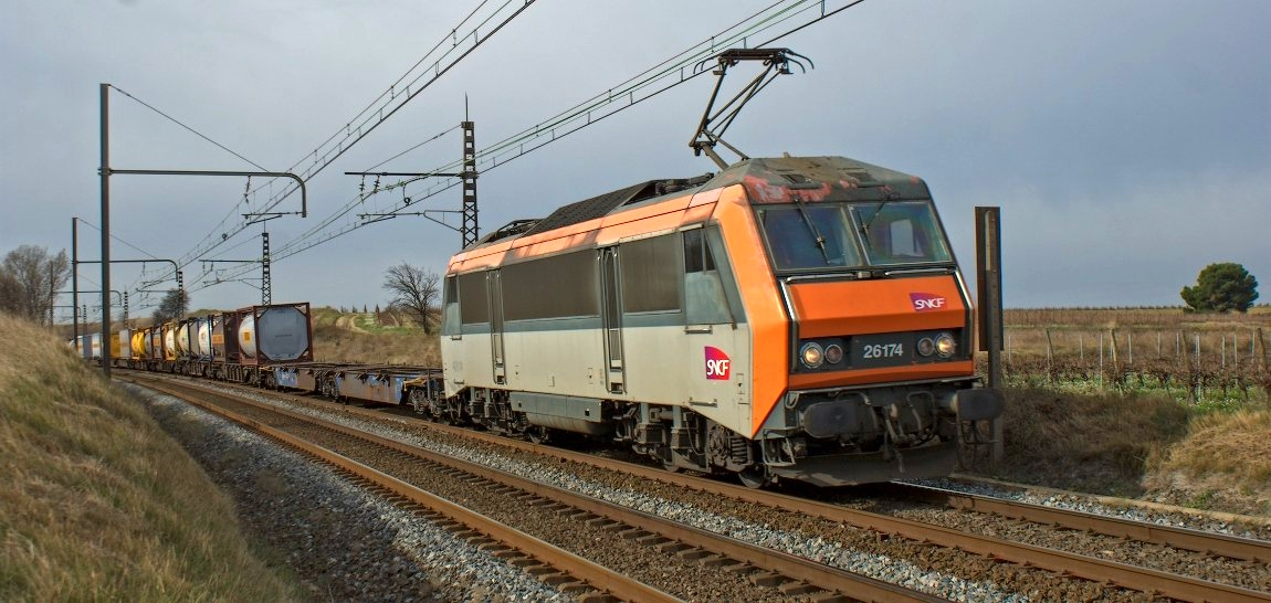 La BB 26174 amb un Teco en direcció Béziers, durant la sessió es van deixar veure amb molta facilitat les Sybics i en diferents decoracions. La BB 26174 con un Teco en dirección Béziers, durante la sesión se dejaron ver con bastante facilidad las Sybics y en diferentes decoraciones.